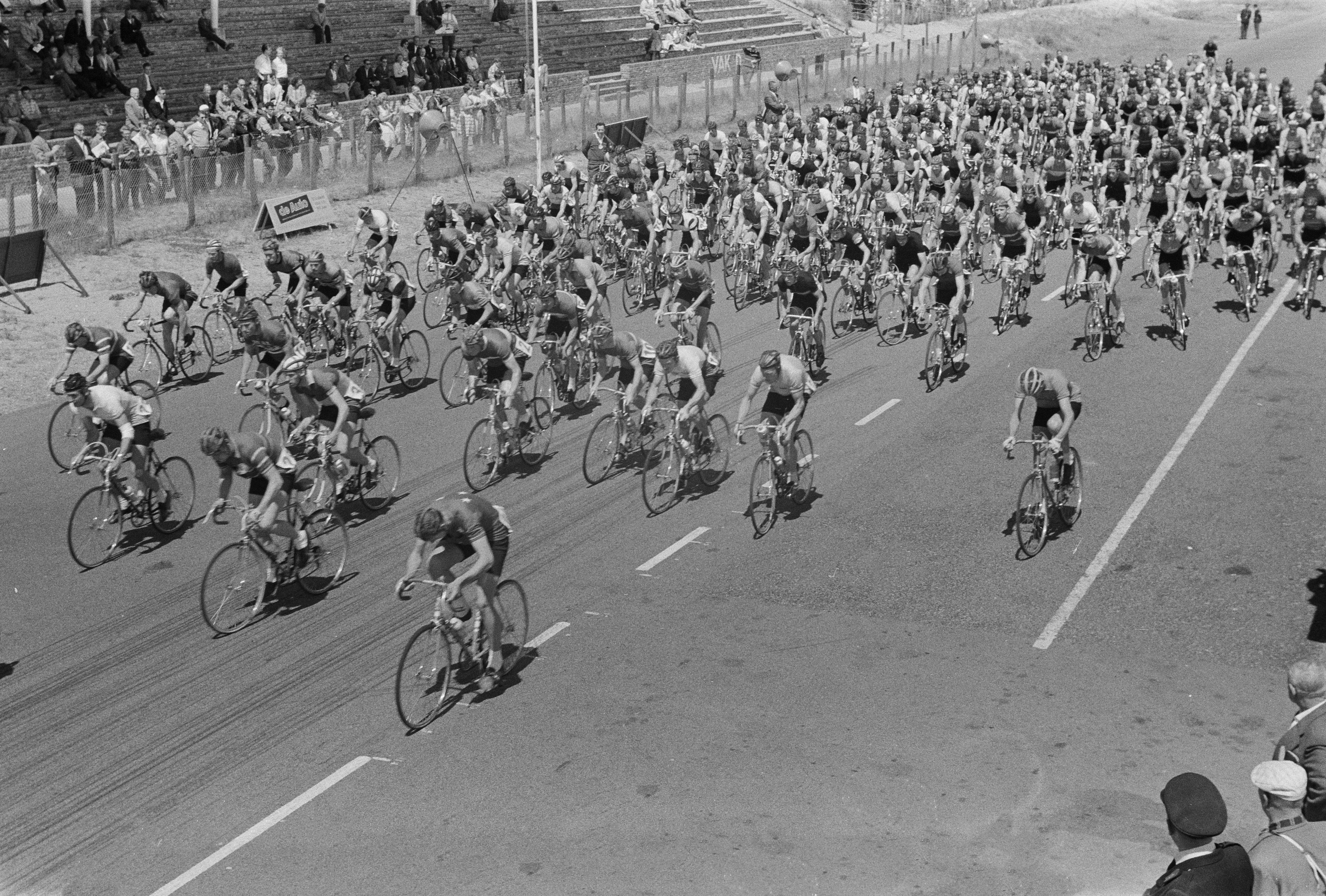 Collectie / Archief : Fotocollectie Anefo Reportage / Serie : [ onbekend ] Beschrijving : Wielerkampioenschap amateurs te Zandvoort Datum : 19 juni 1960 Locatie : Noord-Holland, Zandvoort Trefwoorden : AMATEURS, Wielerkampioenschappen Fotograaf : Pot, Harry / Anefo Auteursrechthebbende : Nationaal Archief Materiaalsoort : Negatief (zwart/wit) Nummer archiefinventaris : bekijk toegang 2.24.01.05 Bestanddeelnummer : 911-3475